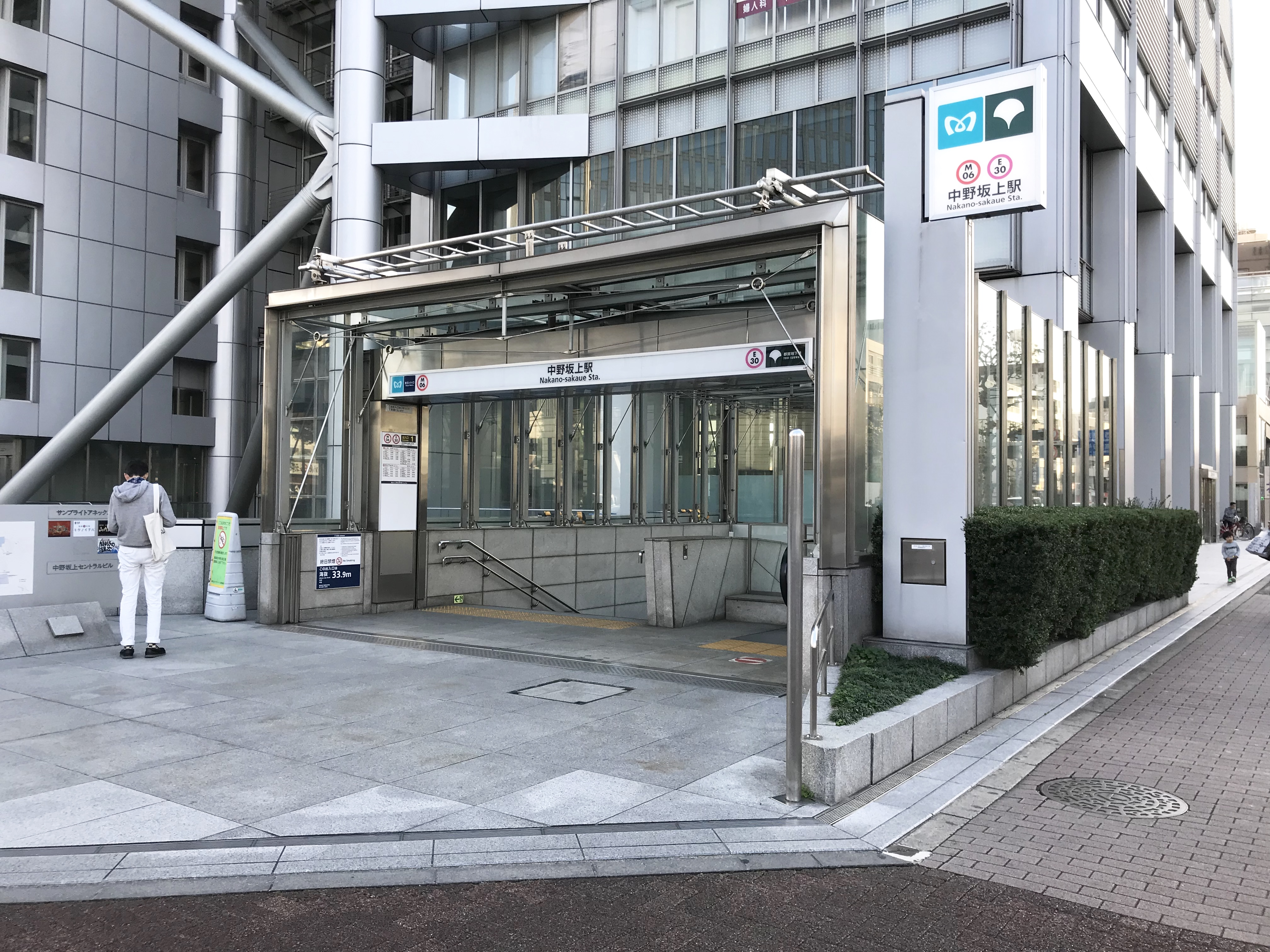 東京メトロ丸ノ内線・都営地下鉄大江戸線中野坂上駅1番出入口